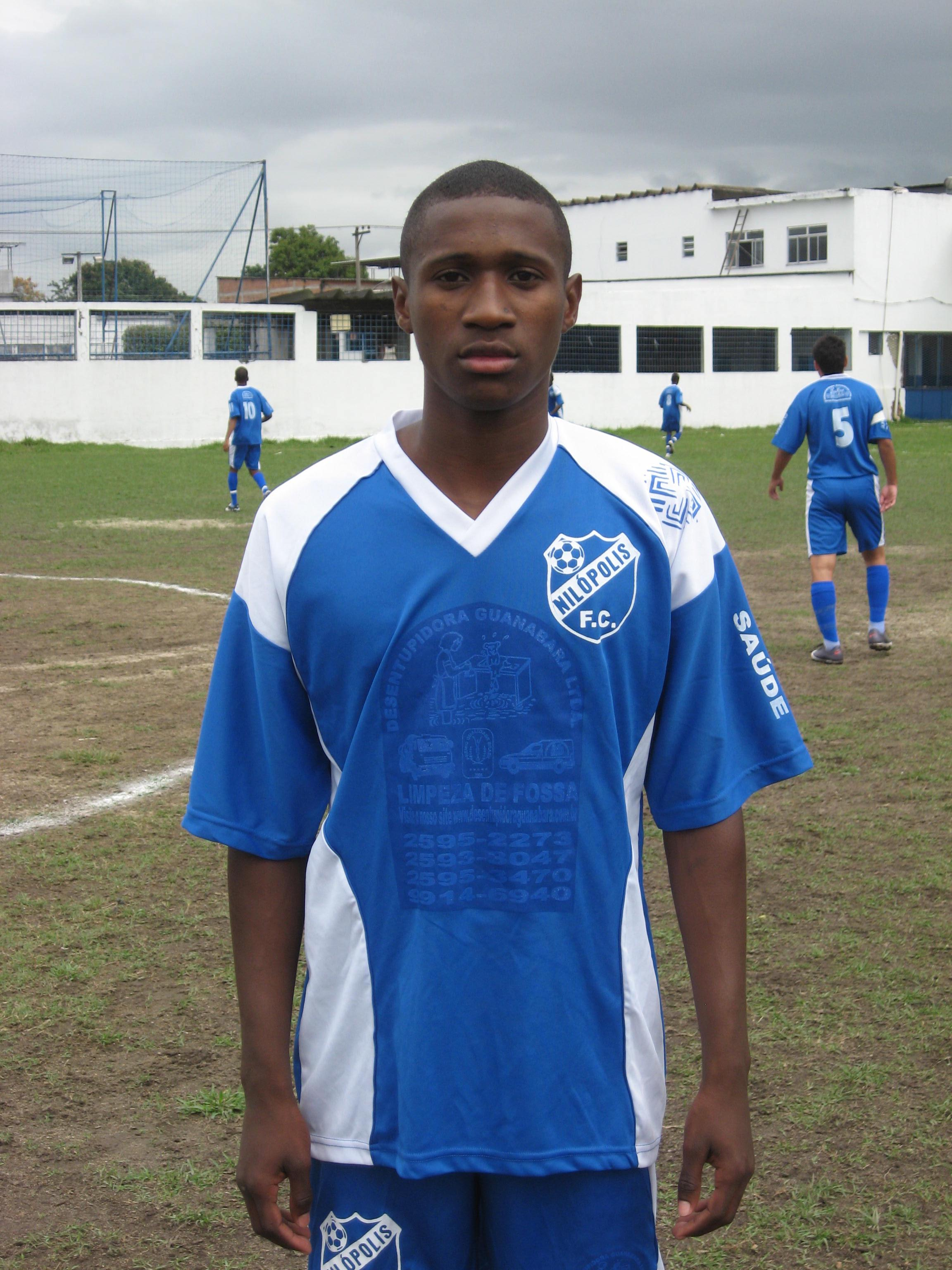 Atleta do Nilópolis Futebol Clube